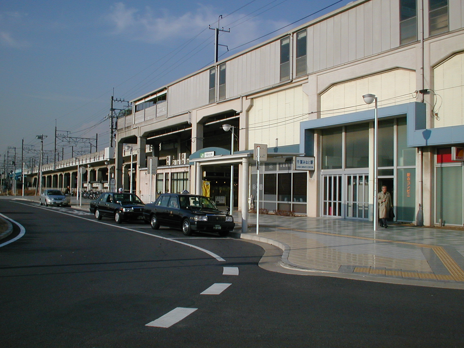 千葉みなと駅(2005/01/19)